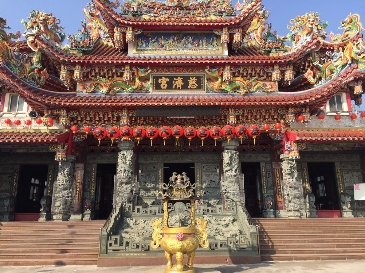 中文（台灣）: 建於溪口游東村的慈濟宮正面照